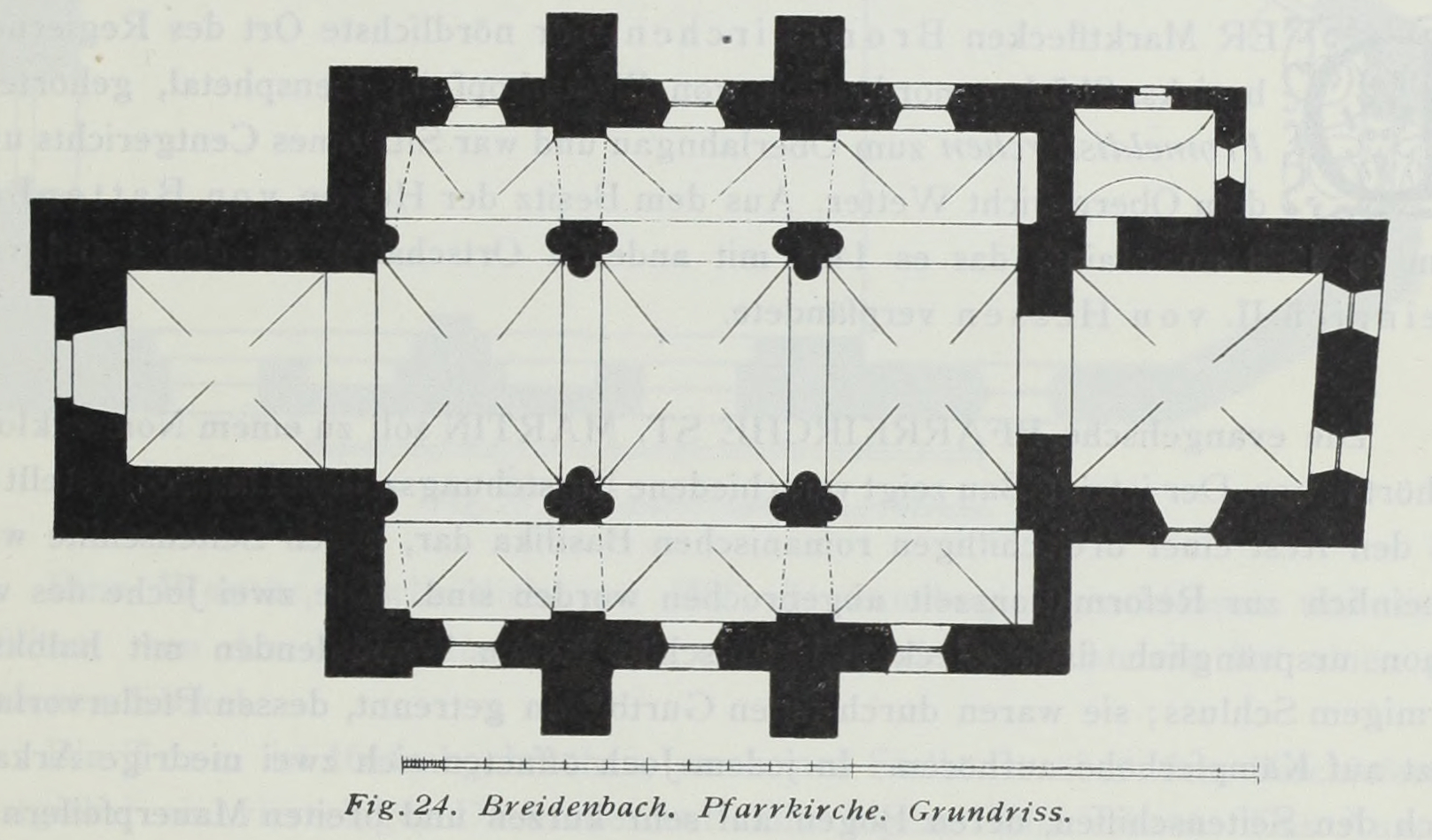 Breidenbach Pfarrkirche Grundriss